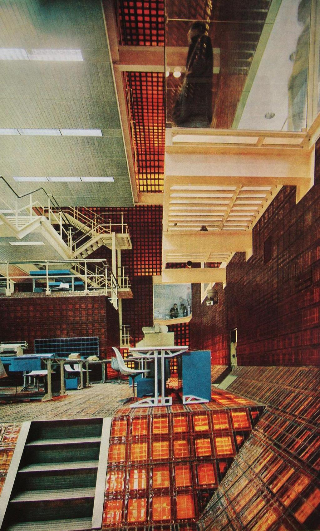 Ambiente en el interior de la casa matriz del Banco Municipal de la Ciudad de Buenos Aires (hoy Banco Ciudad de Buenos Aires). Obra de los arquitectos Manteola, Petchersky, Sánchez Gómez, Santos, Solsona y Viñoly. Calles Tte. Gral. Juan D. Perón y Florida.